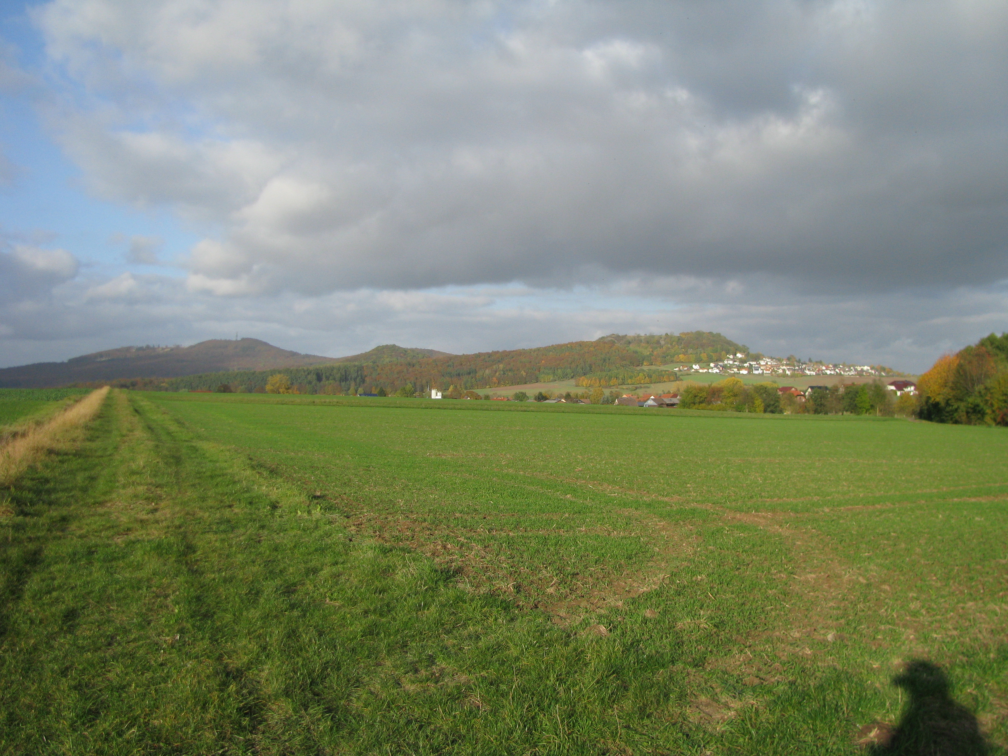 der Hasunger Berg von der Feldmark von Oelshausen aus gesehen